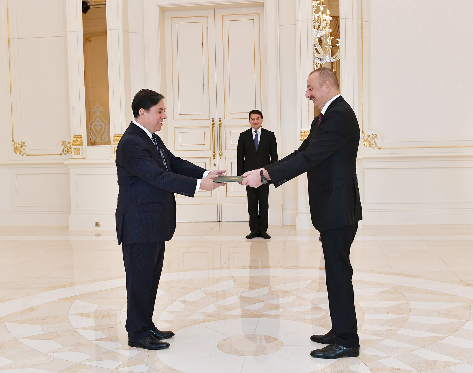 İlham Əliyev Braziliyanın Azərbaycana təyin olunmuş səfirinin etimadnaməsini qəbul edərkən